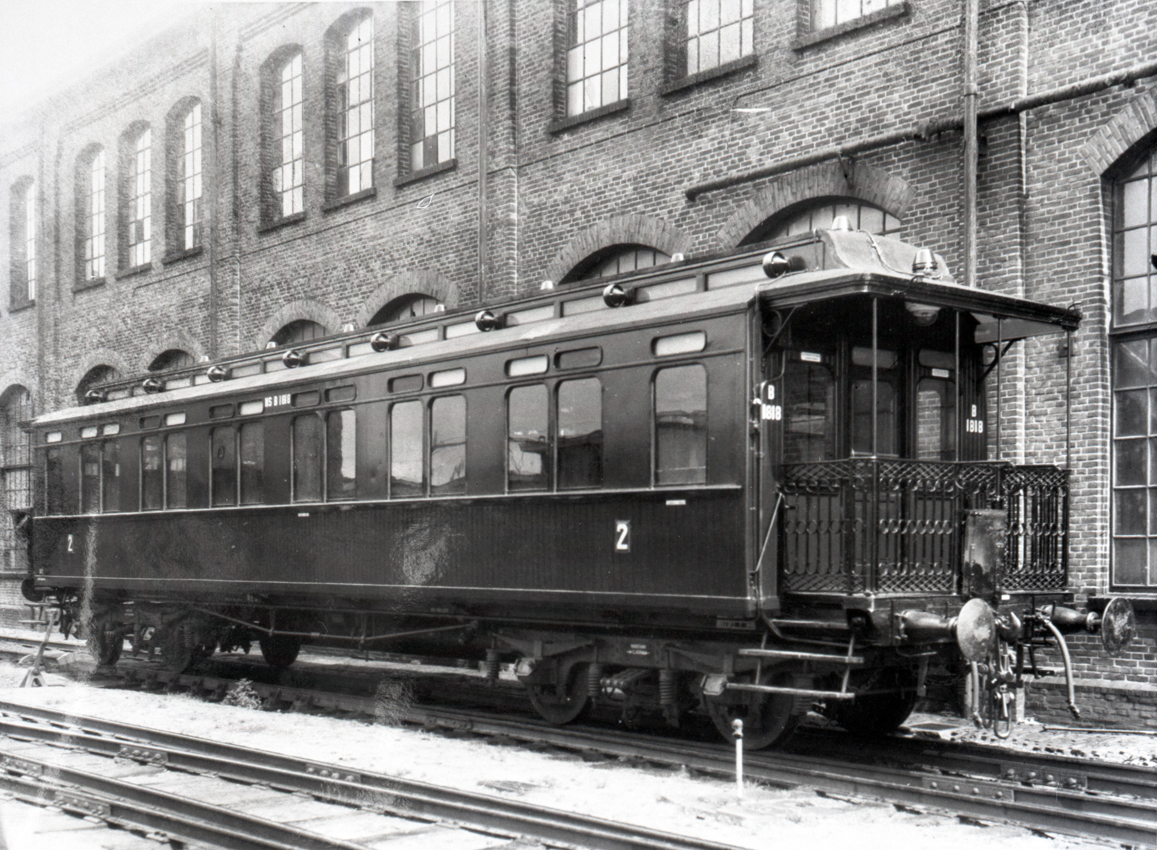 Afbeelding van het van oorlogsschade herstelde rijtuig NS B 1818.